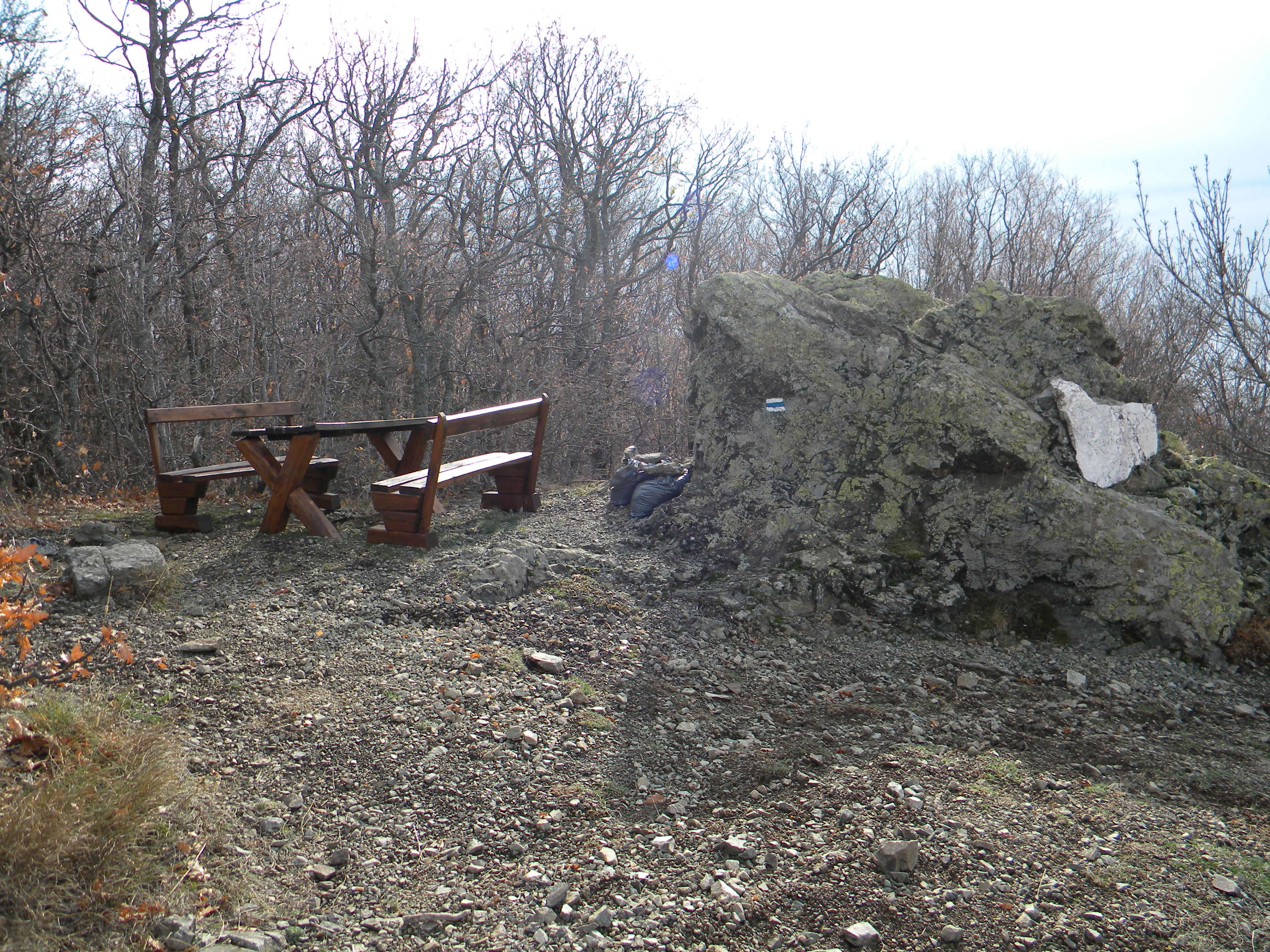 хижа Соколна